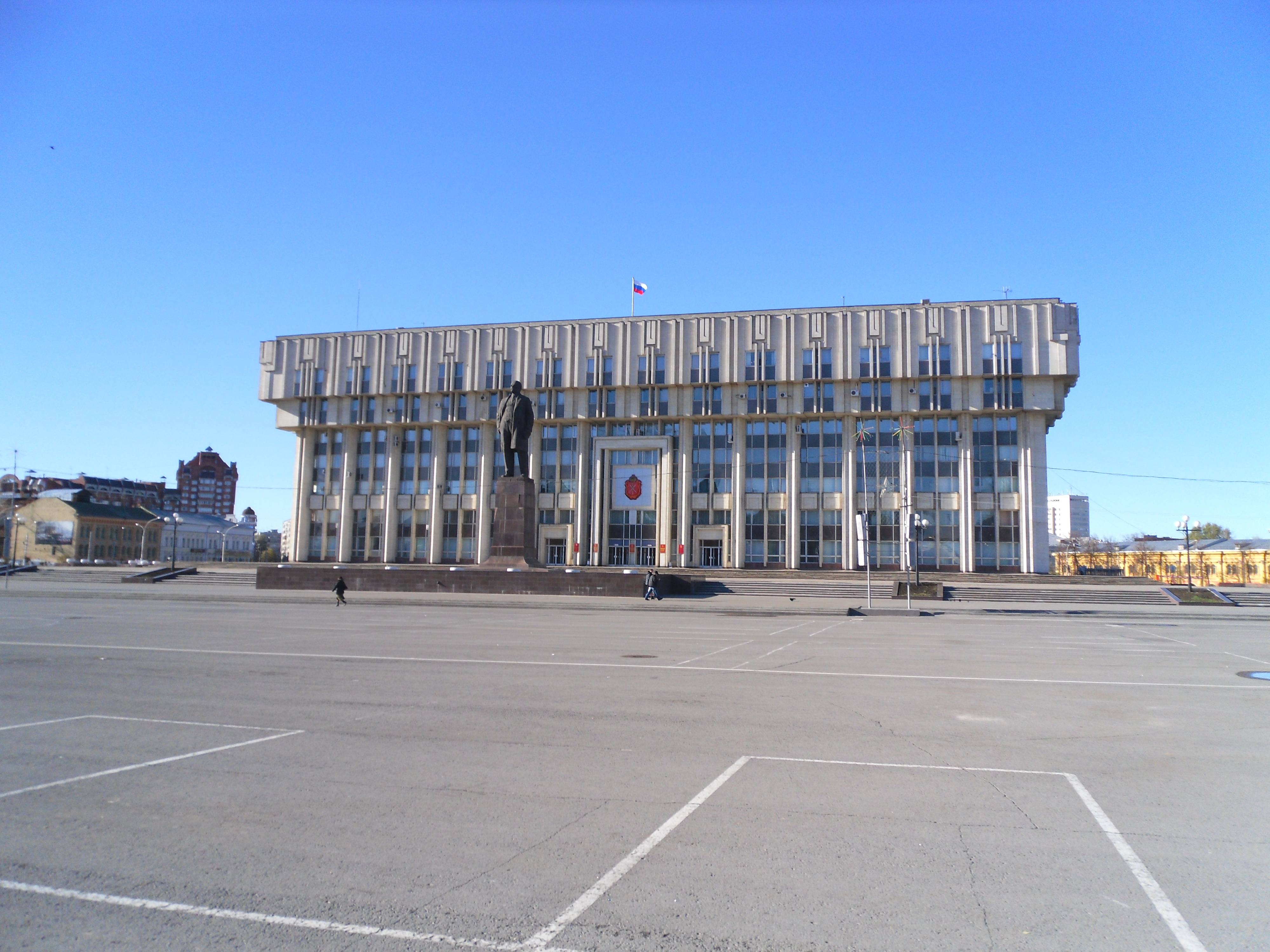 просп. Ленина 2, Тула. Здание областной администрации и муниципальная администрация (мэрия